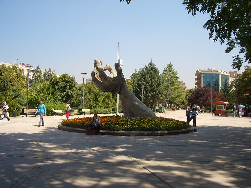 Ankara, Sıhhıye'de Abdi İpekçi Parkı'ndan bir görünüm